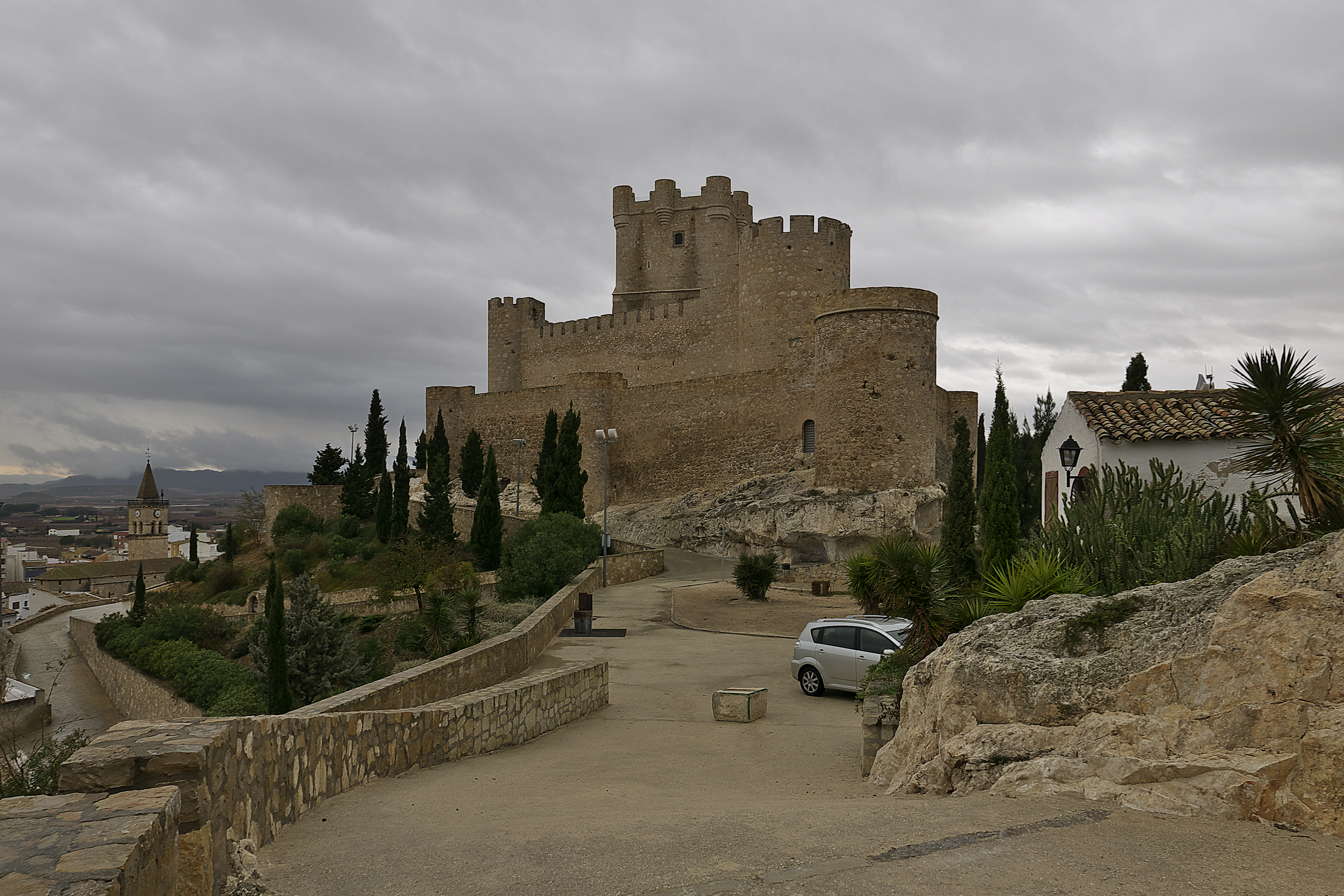 Castillo de Juan Pacheco en la villa de Villena.